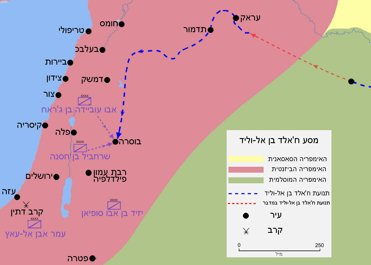 תנועת ח'אלד בן אל-וליד במדבר בדרך לארץ ישראל שנת 634